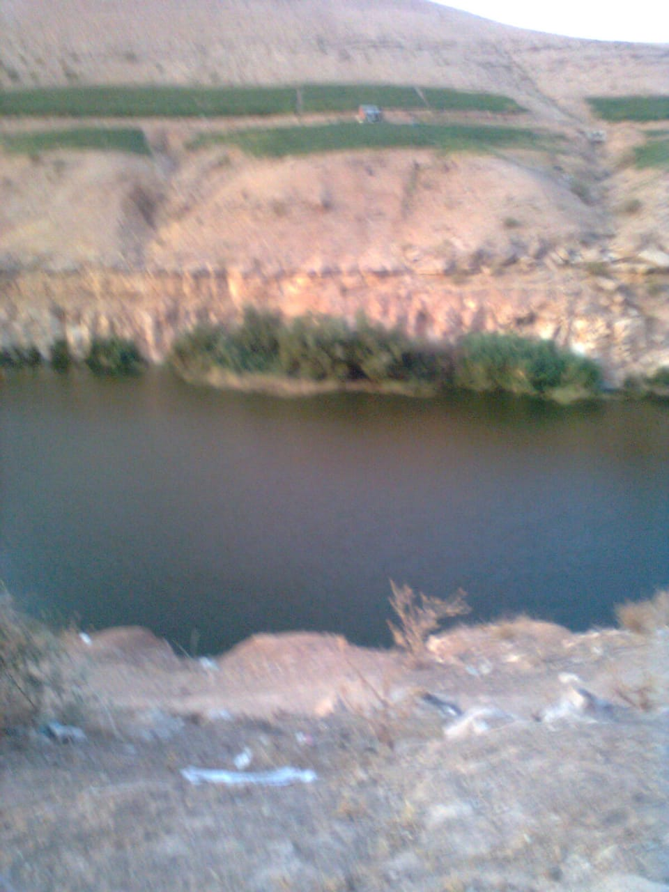 بحيرة في الهيدان \بالقرب من سد الواله